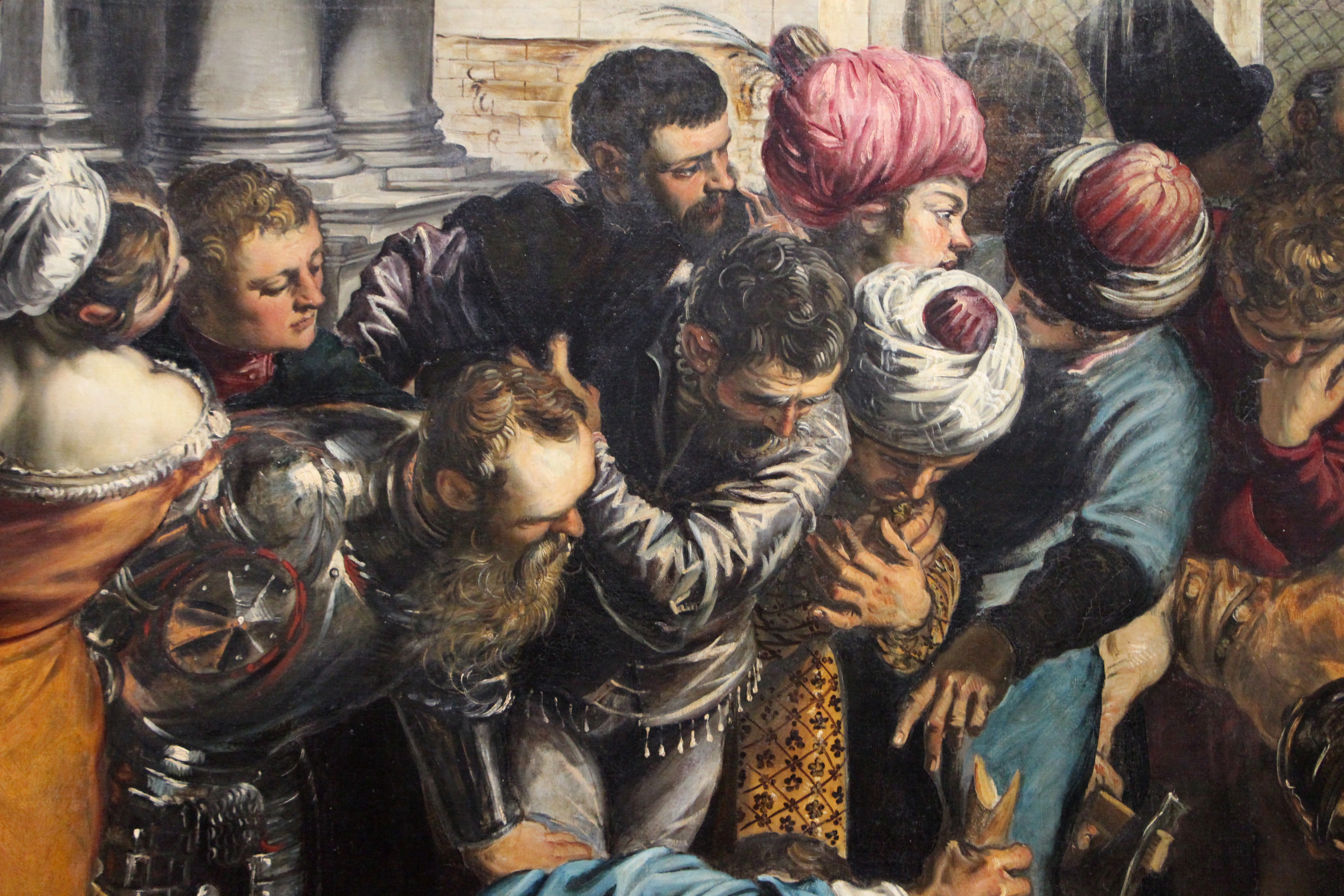 Gallerie dell'Accademia - MIBAC The making of this document was supported by Wikimedia CH. (Submit your project!) For all the files concerned, please see the category Supported by Wikimedia CH. This is a photo of a monument which is part of cultural heritage of Italy.